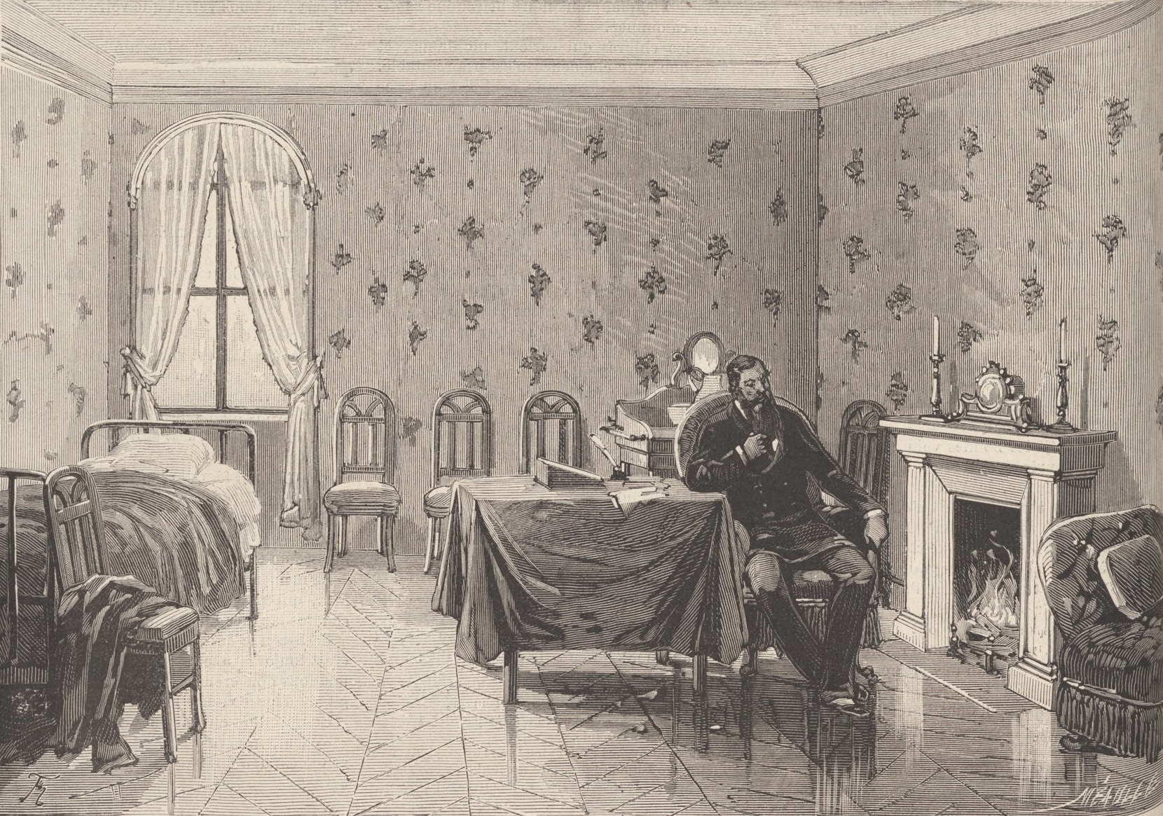 Le « petit local » où M. de Baudry-d'Asson a été détenu, dans la nuit du 11 au 12 novembre, à la Chambre des députés. Dessin de M. Haenen.